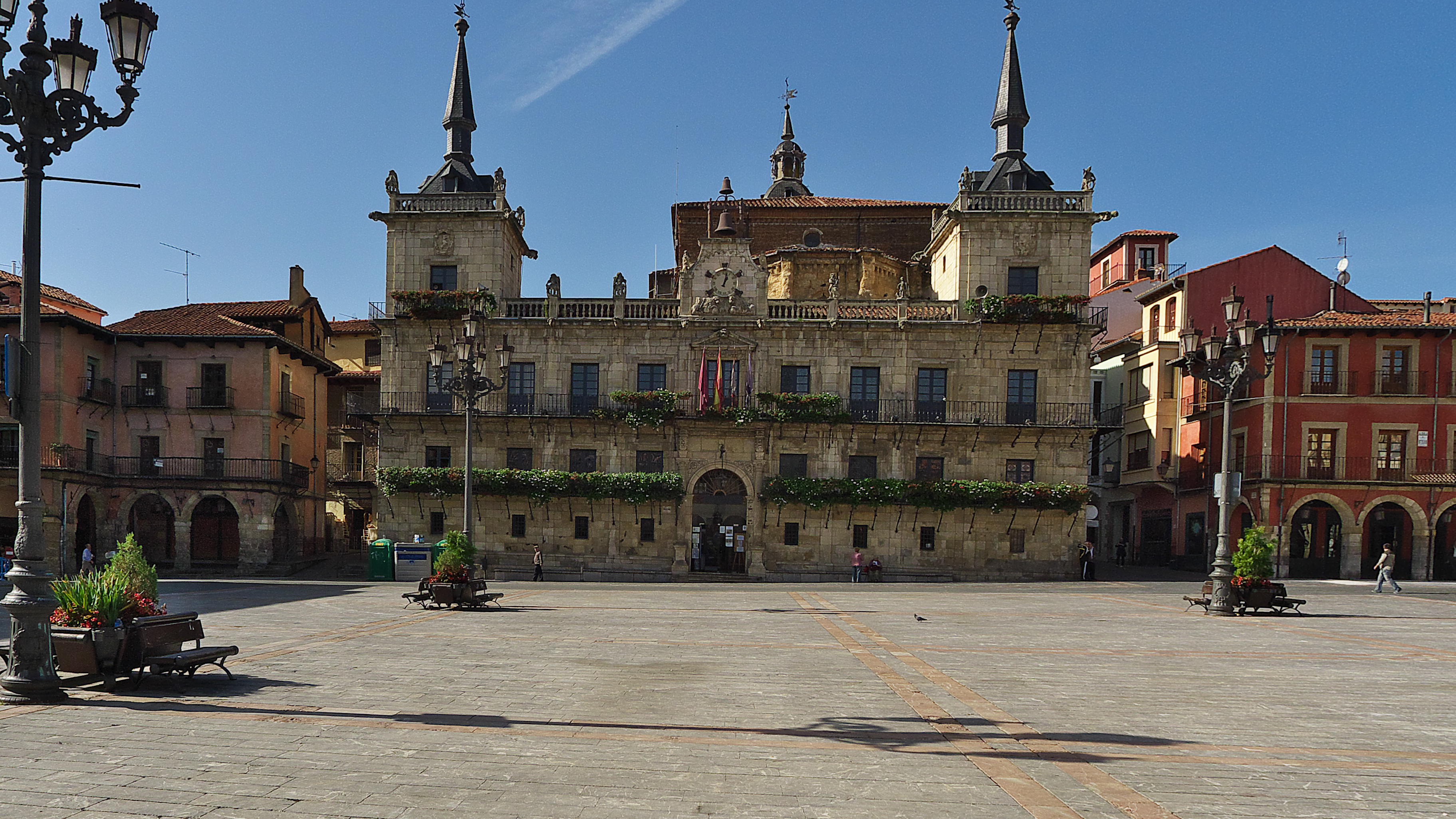 Felipe II autoriza la construcción del primer Consejo de la ciudad. Juan del Ribero Rada (1584) realiza el magnífico edificio.